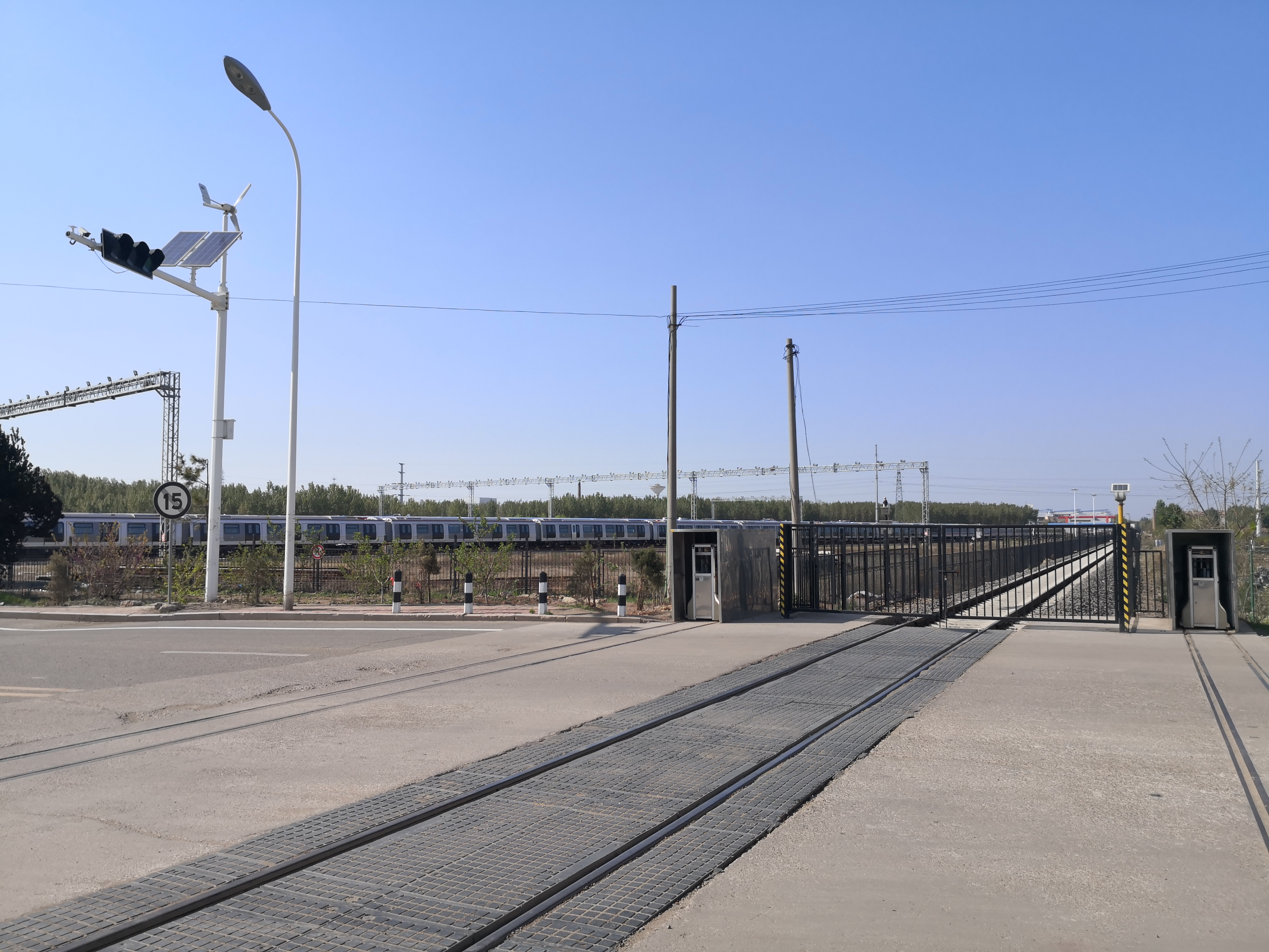 中车青岛四方机车车辆股份有限公司棘洪滩制造基地专用铁路线